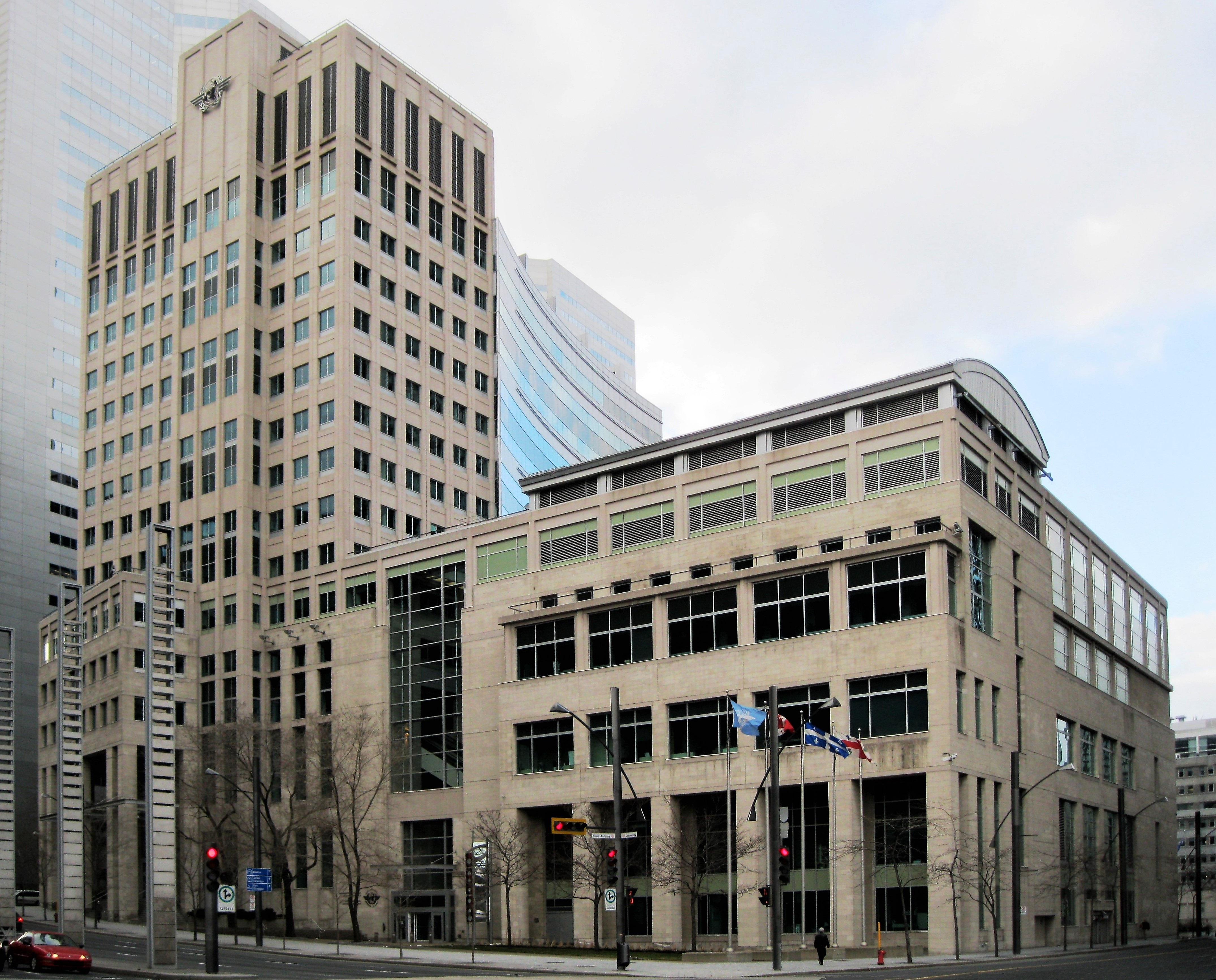 La Maison de l'OACI, construite en 1994-1996 dans le but d'héberger le siège social de l'Organisation de l'Aviation Civile Internationale (OACI), est située au 999, rue University, Montréal.